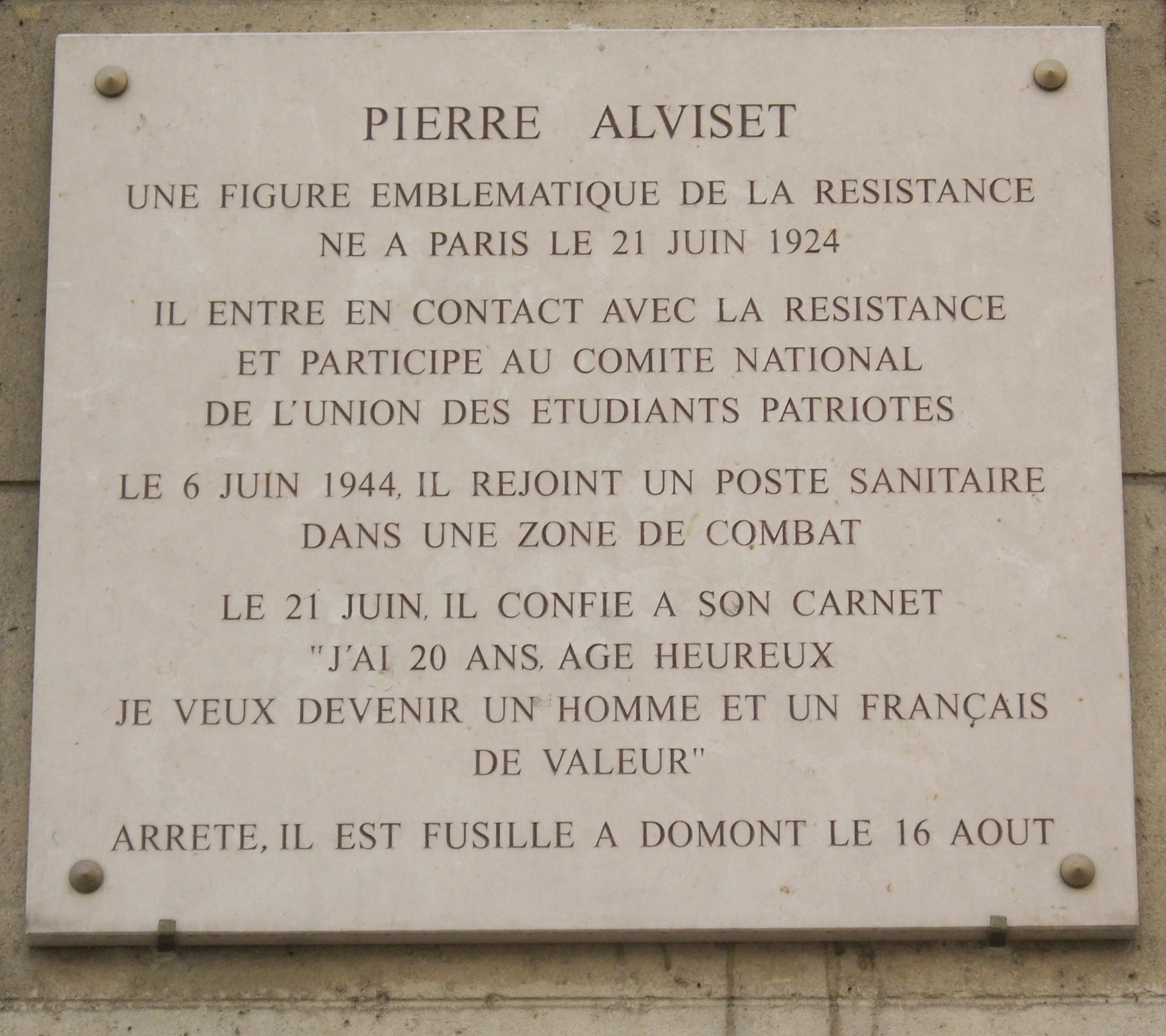 Plaque apposée sur la façade du collège Pierre-Alviset, 88 rue Monge, Paris 5e. « Pierre Alviset, une figure emblématique de la Résistance, né à Paris le 21 juin 1944. Il entre en contact avec la Résistance et participe au Comité national de l'Union des étudiants partriotes. Le 6 juin 1944, il rejoint un poste sanitaire dans une zone de combat. Le 21 juin, il confie à son carnet : "J'ai 20 ans, âge heureux. Je veux devenir un homme et un Français de valeur." Arrêté, il est fusillé à Domont le 16 août. »